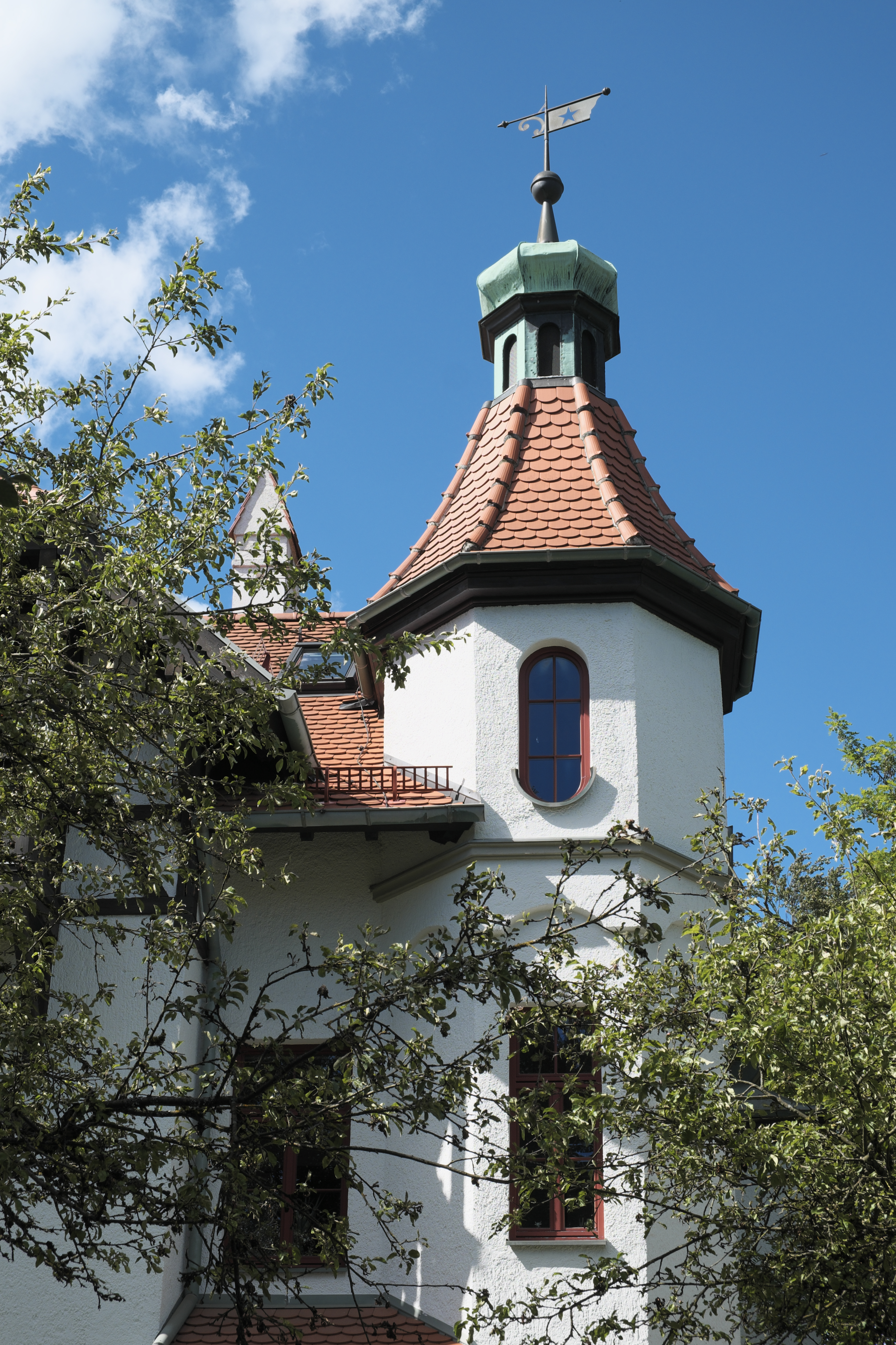 Villa in der Hofmillerstraße 26 in Obermenzing im Stadtbezirk Pasing-Obermenzing in München (Bayern/Deutschland)